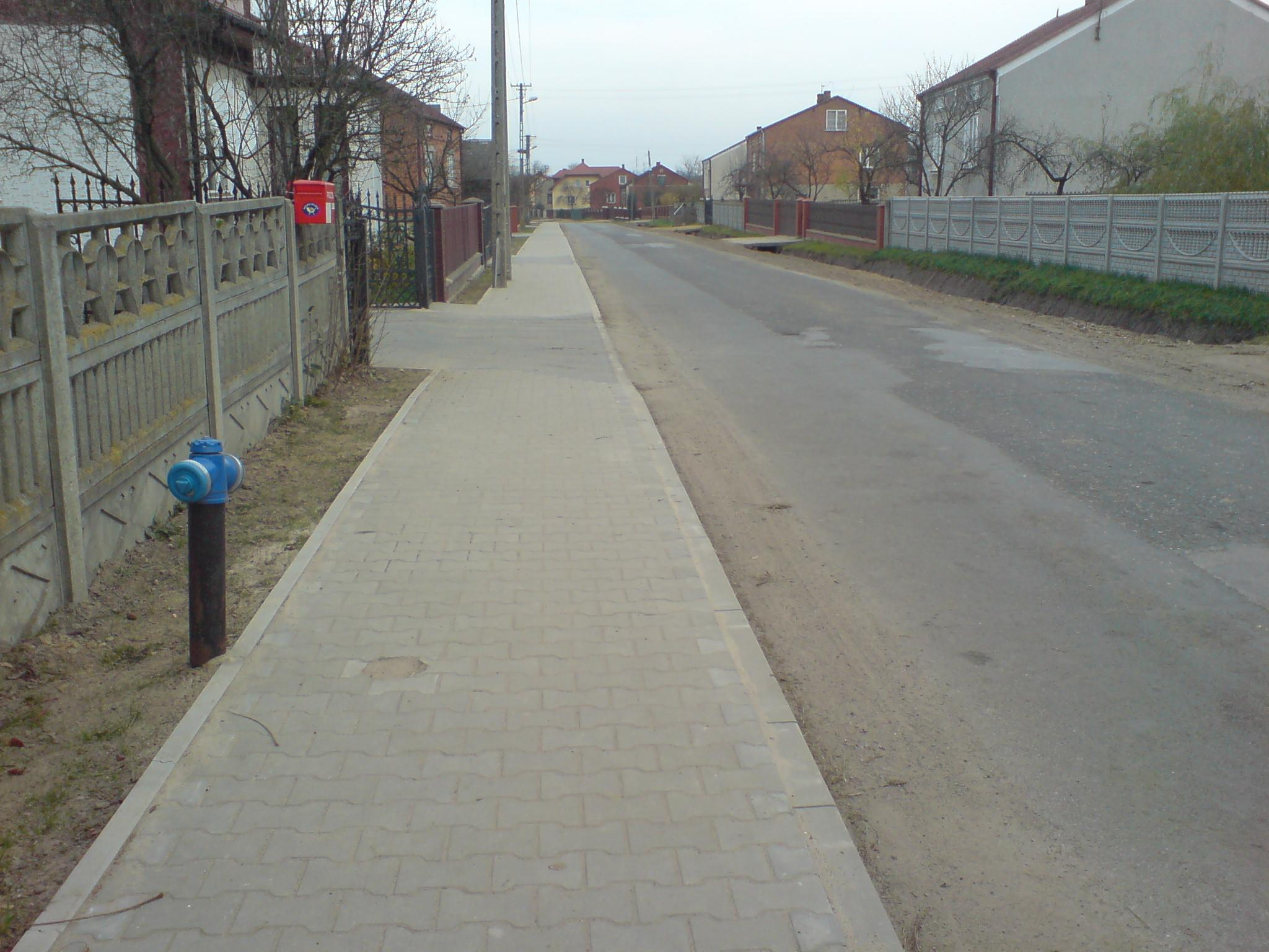 To jest chodnik w miejscowości Międzybórz w województwie łódzkim, powiecie opoczyńskim i gminie Opoczno